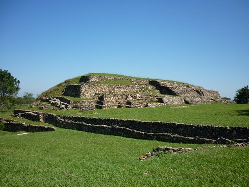 Edificio principal, vista posterior